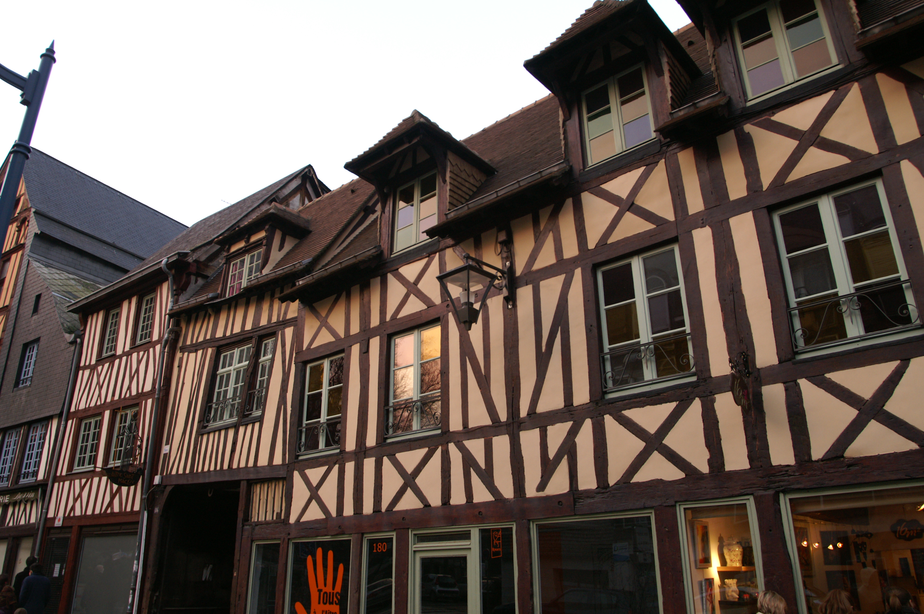 Maison, 178-182 rue de Martainville à Rouen.